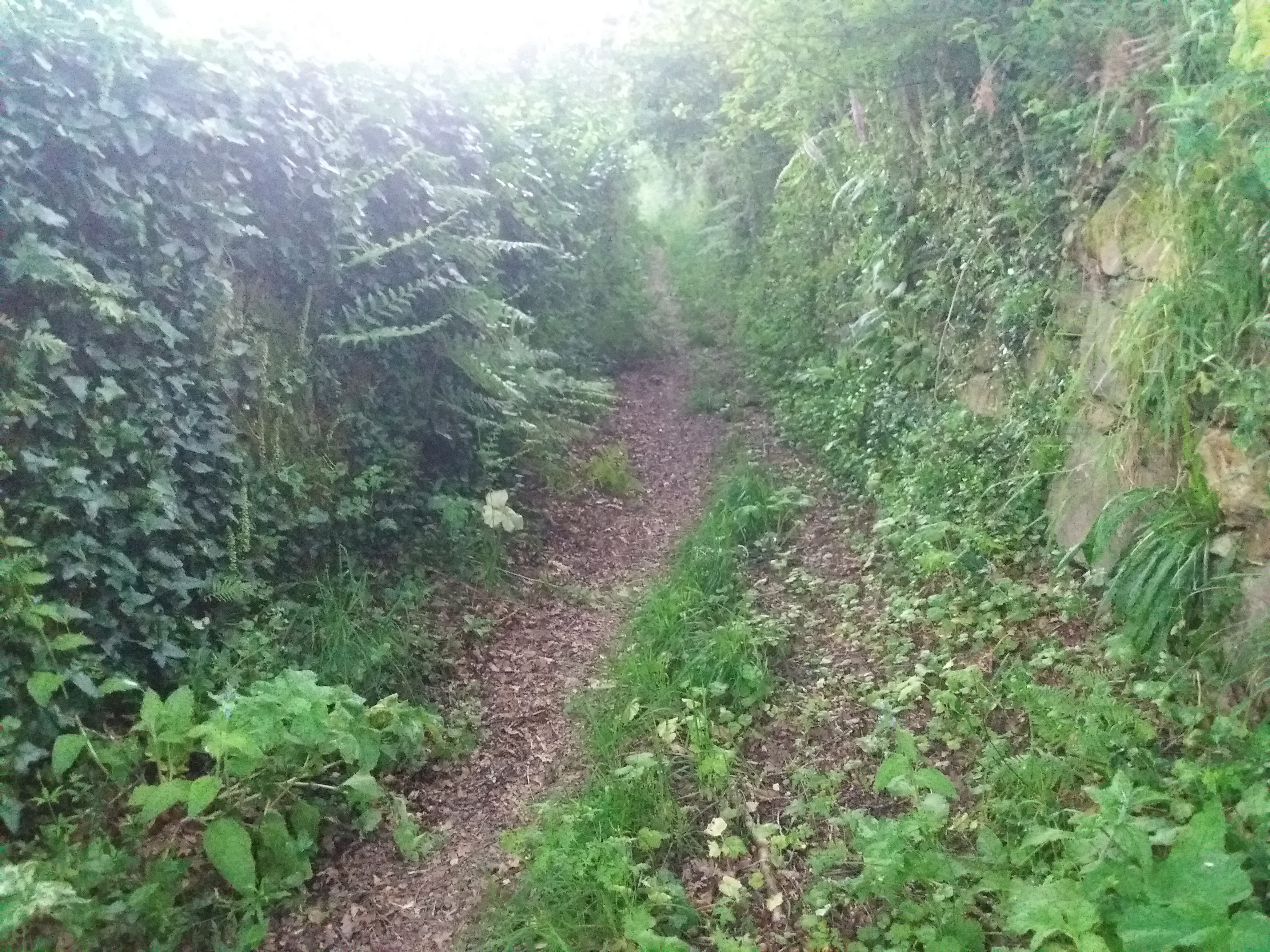 O Camiño de Fontán entre a pousa e o pazo do mesmo nome.